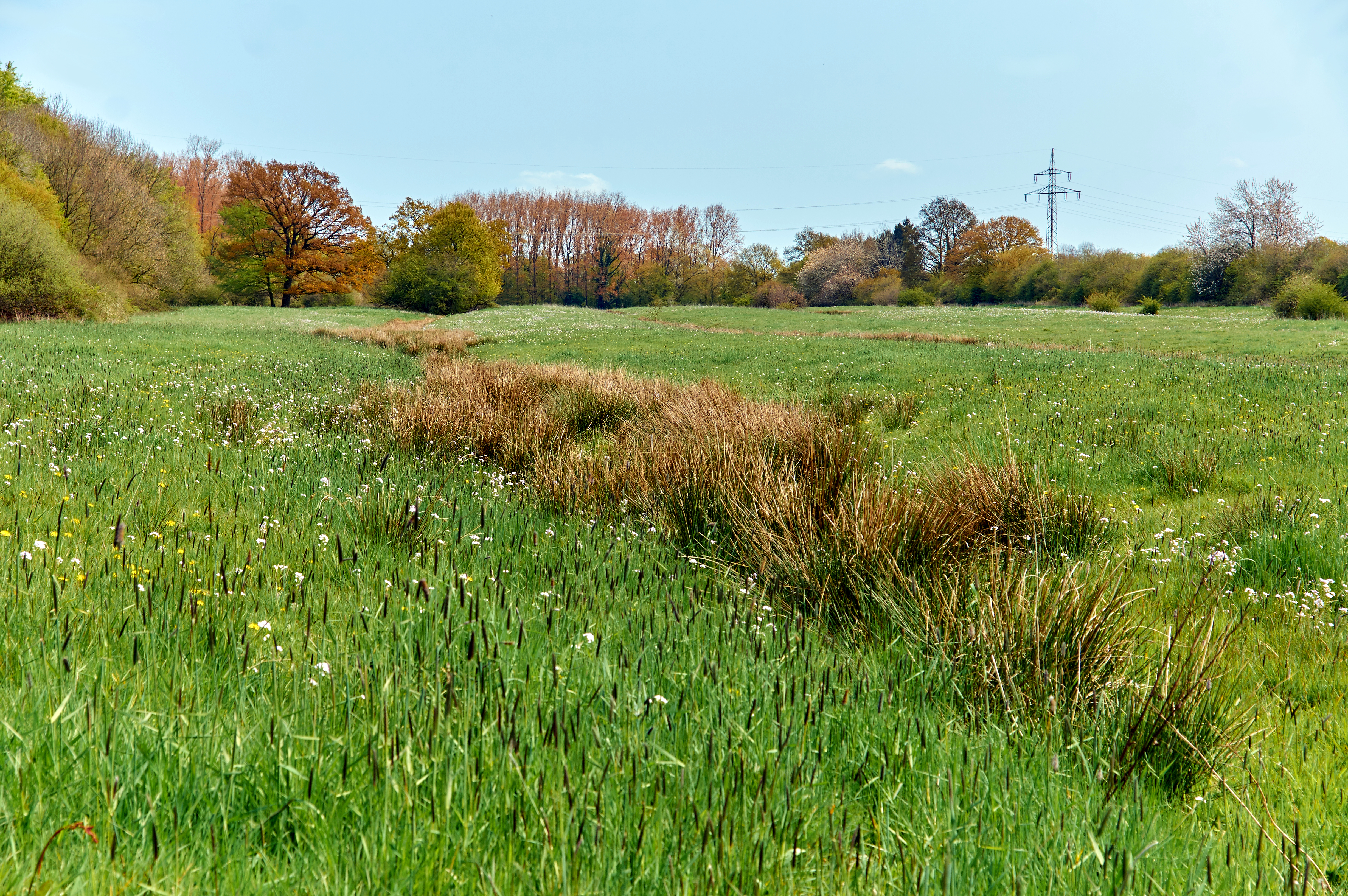 Historische Wölbackerstrukturen im Naturschutzgebiet Brink (NSG COE-055) in Coesfeld, Kreis Coesfeld, Nordrhein-Westfalen.